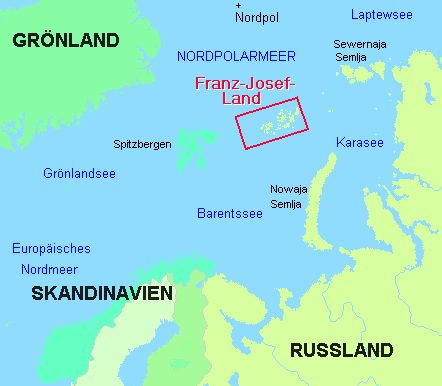 Karte selbst angefertigt